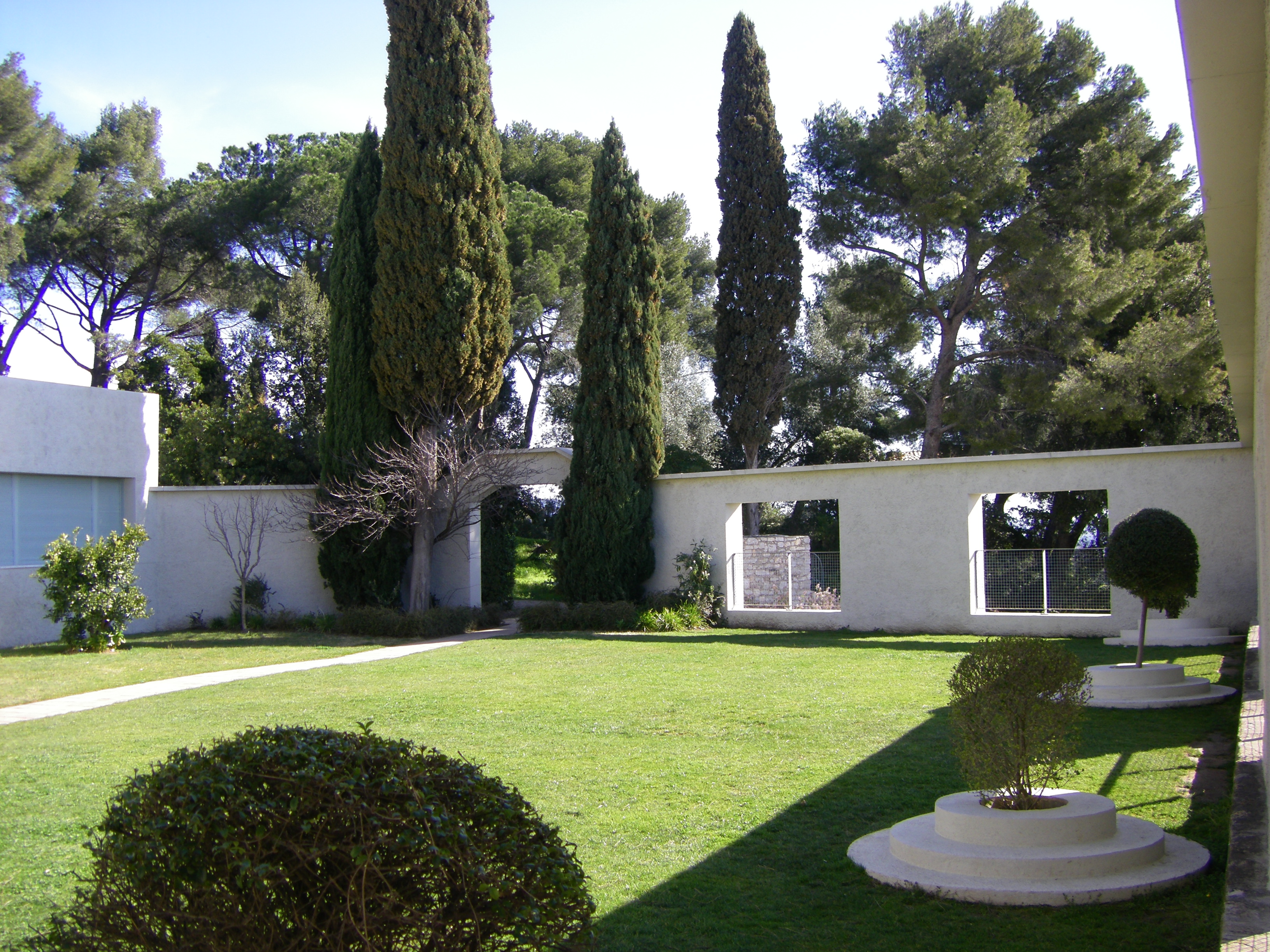 Südlage mit Sicht auf die Hyères